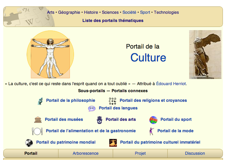 Portail Culture de Wikipédia (détail) - Octobre 2012